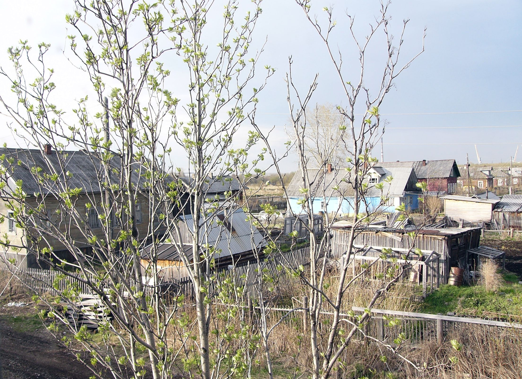 Лесобиржа 19 весна